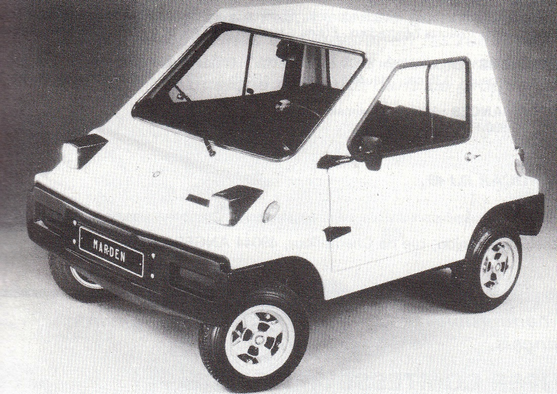 MARDEN minicar